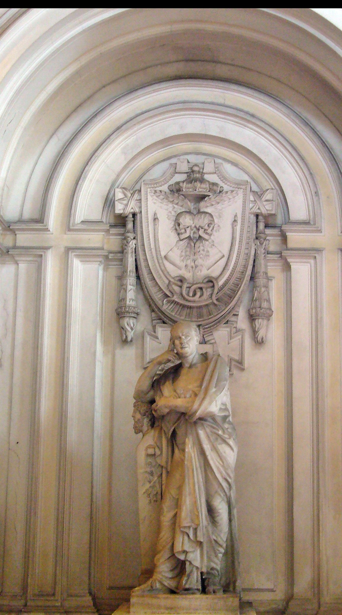 Roma, Villa del Priorato dei Cavalieri di Malta: Santa Maria del Priorato, cenotafio di Giovanni Battista Piranesi